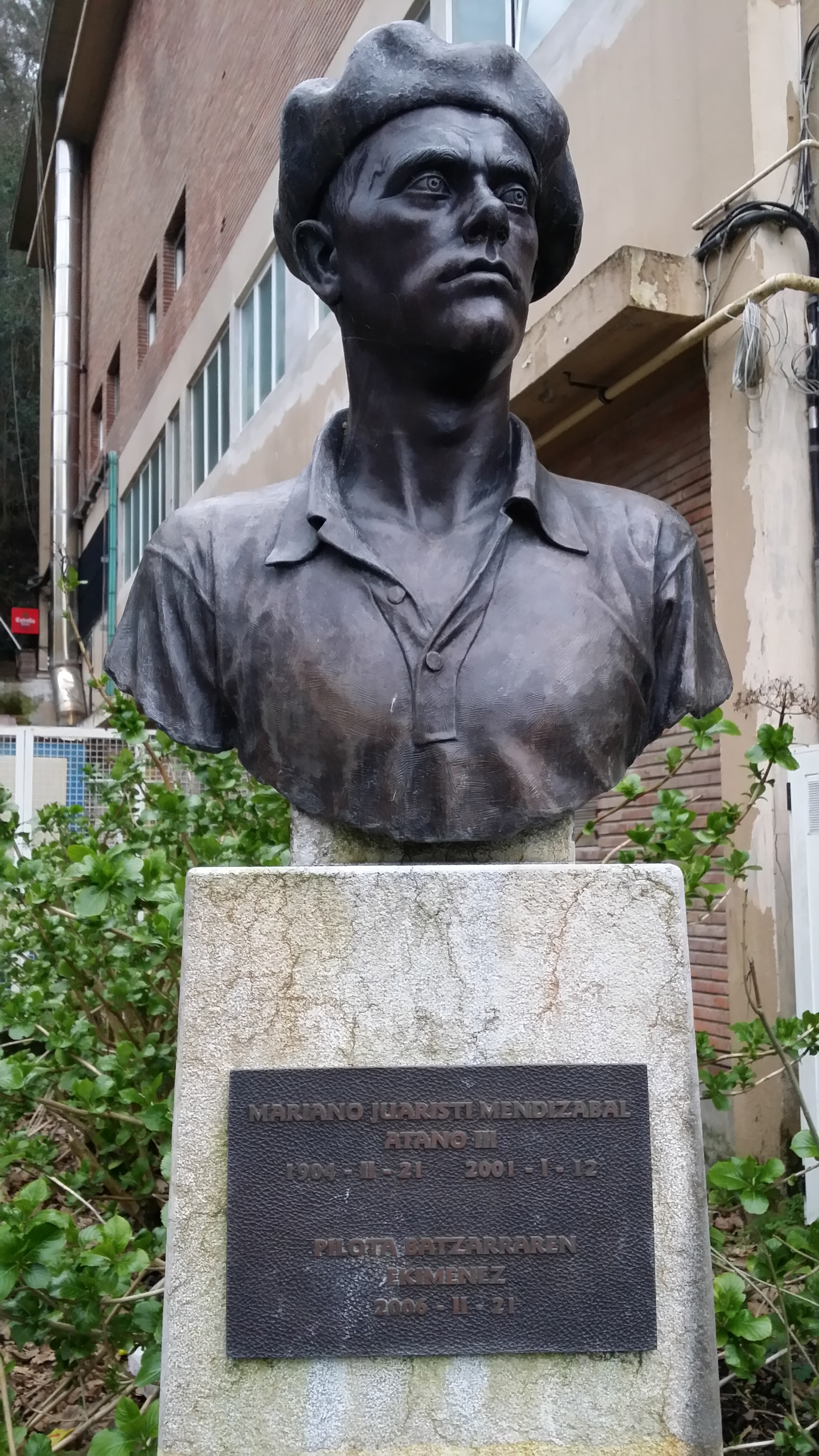 Atano III.aren eskultura Amaran